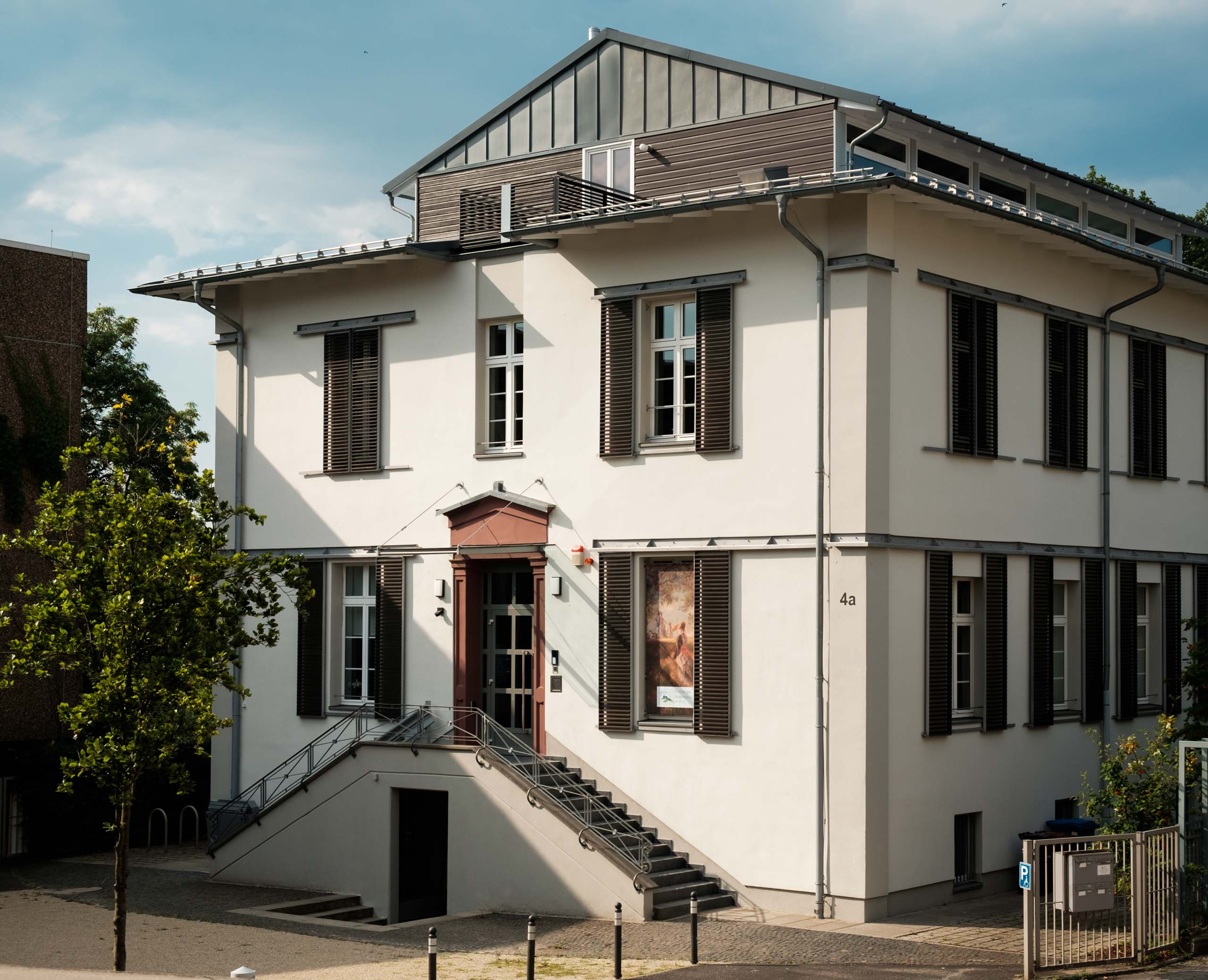 Villa Winter in Kronger (Taunus), 2018